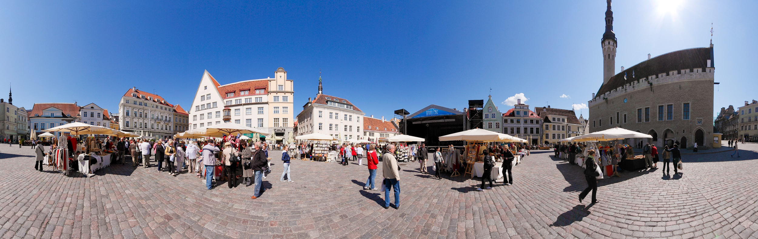 Raekoja plats (Tallinn)